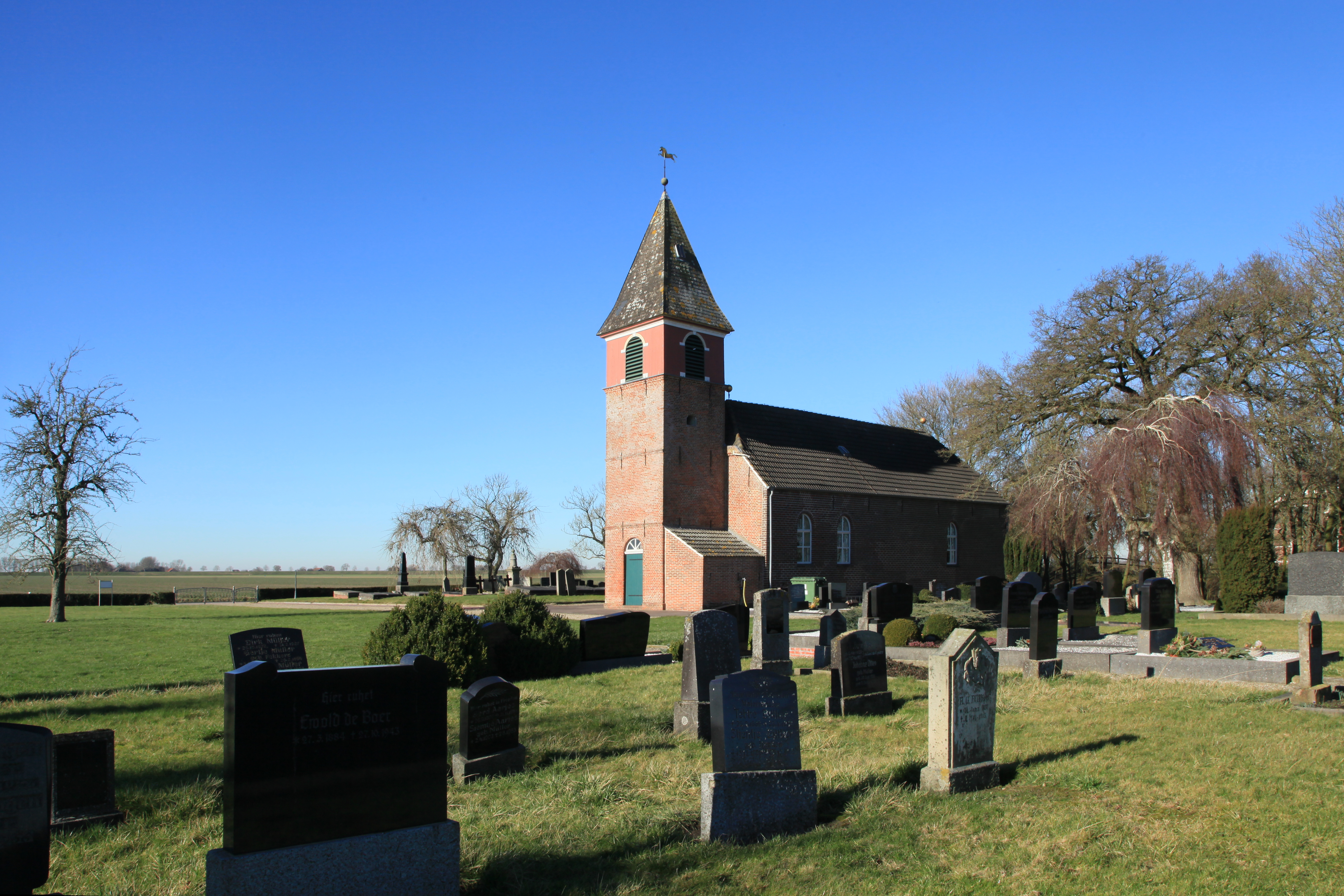 Landschaftspolder Kirche auf dem Landschaftspolder Friedhof, Landschaftspolder in Bunde (Germany)